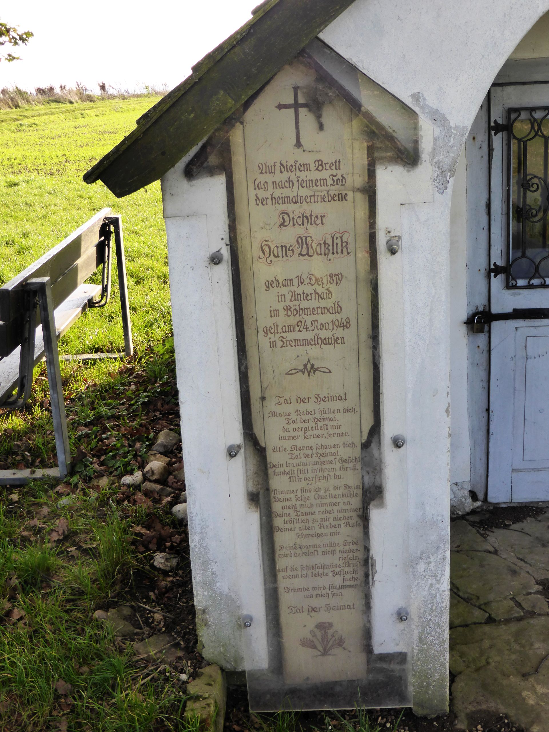 Watzlik-Kapelle (Pettendorf)